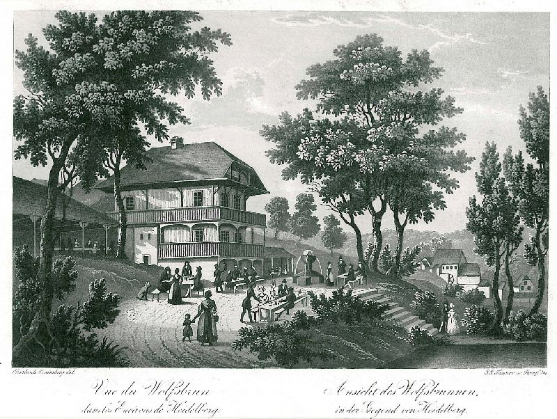 Ansicht des Wolfsbrunnen in der Gegend von Heidelberg, 15 x 22,5 cm